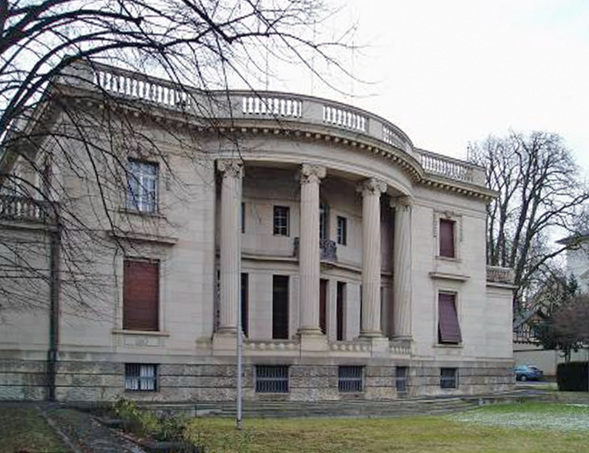 selbst fotografiert (01/2005)